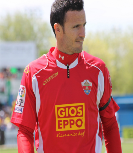 Manu herrera portero del elche cf